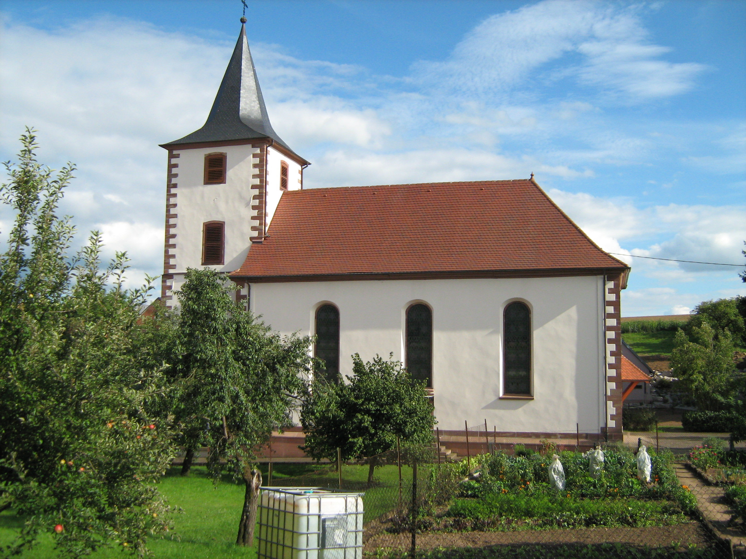 eglise d'Altdorf à Alteckendorf